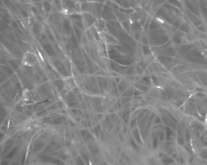 Wirrlagen-Vliesstoff unter dem Mikroskop, Putzlappen